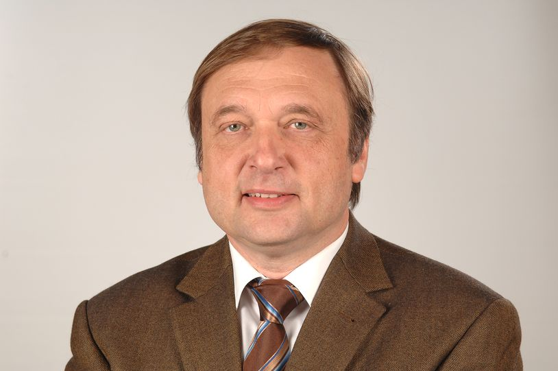 Portrait Willi Xylander